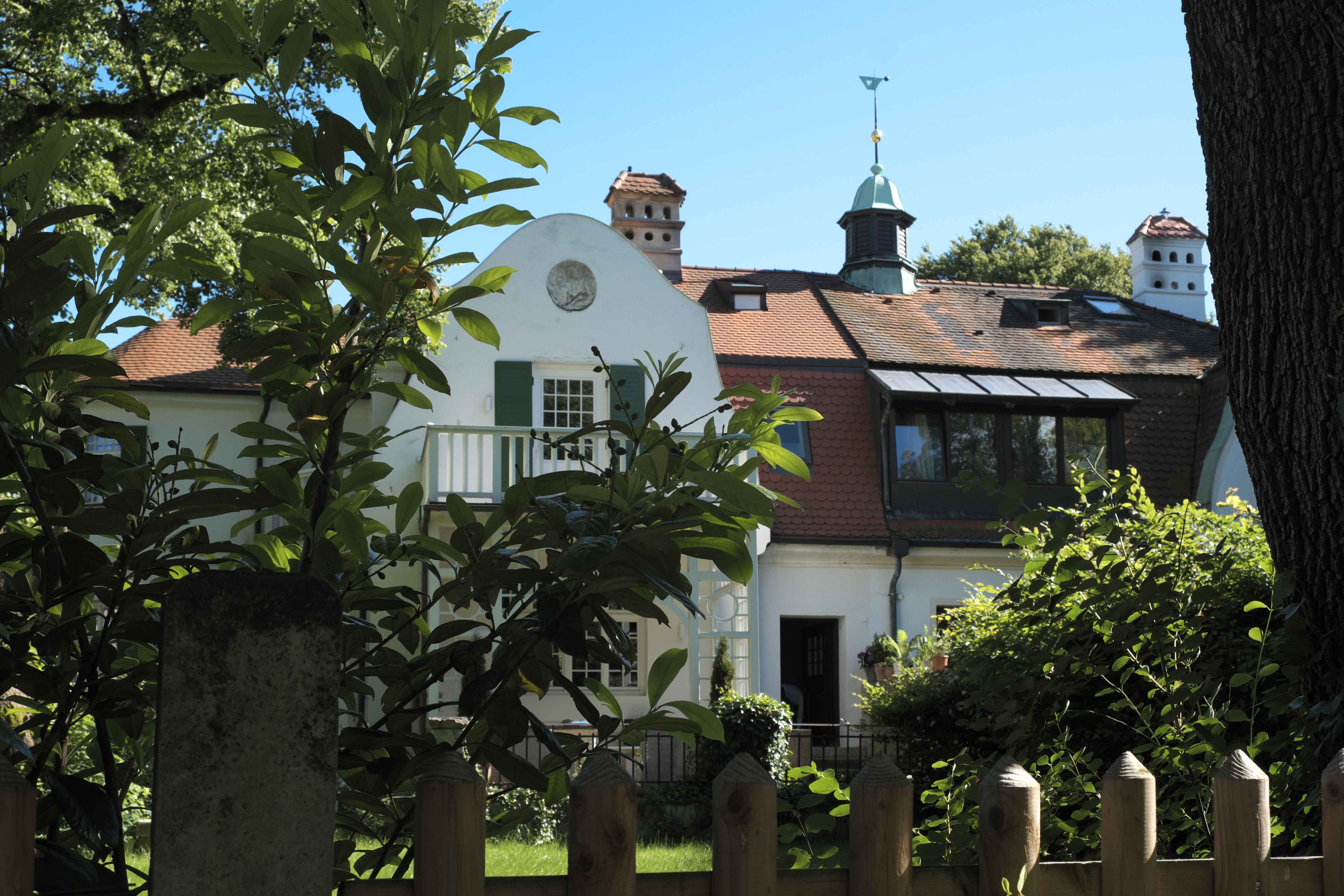 Villa in der Marsopstraße 4b in Obermenzing im Stadtbezirk Pasing-Obermenzing in München (Bayern/Deutschland)